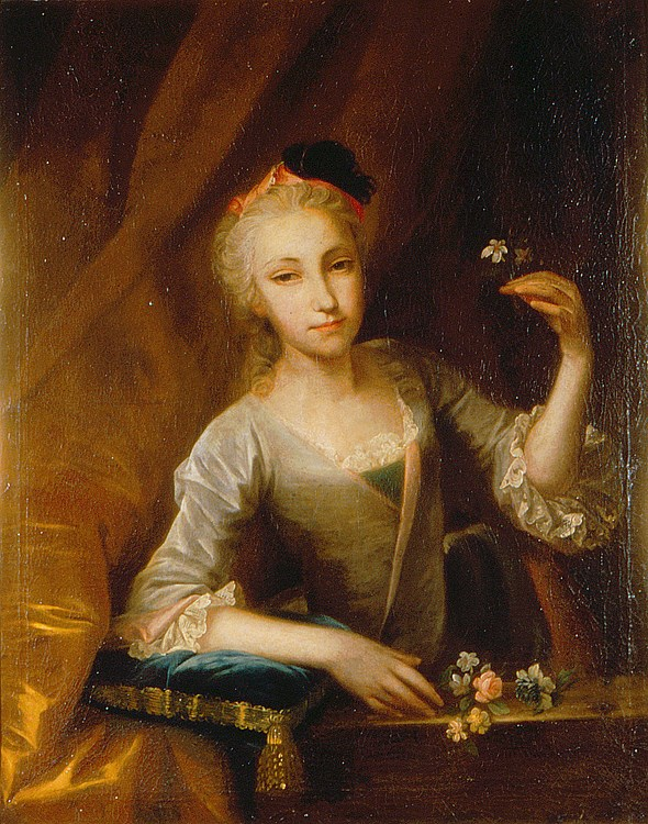 Marie Ana Ludowiga Von Roll von Emmenholz